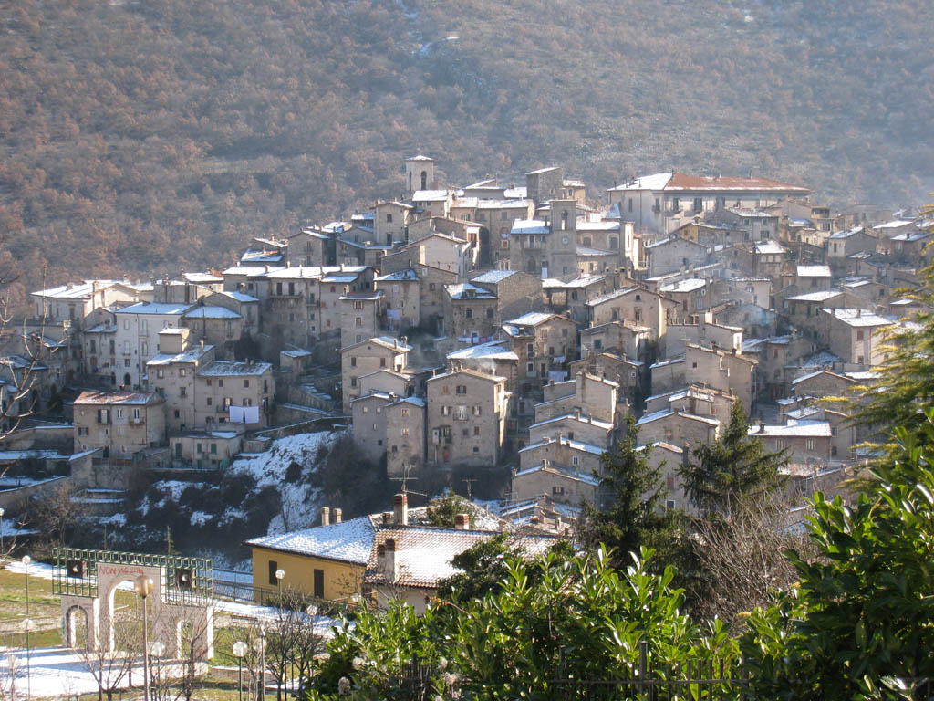 Fotografia del borgo di Scanno